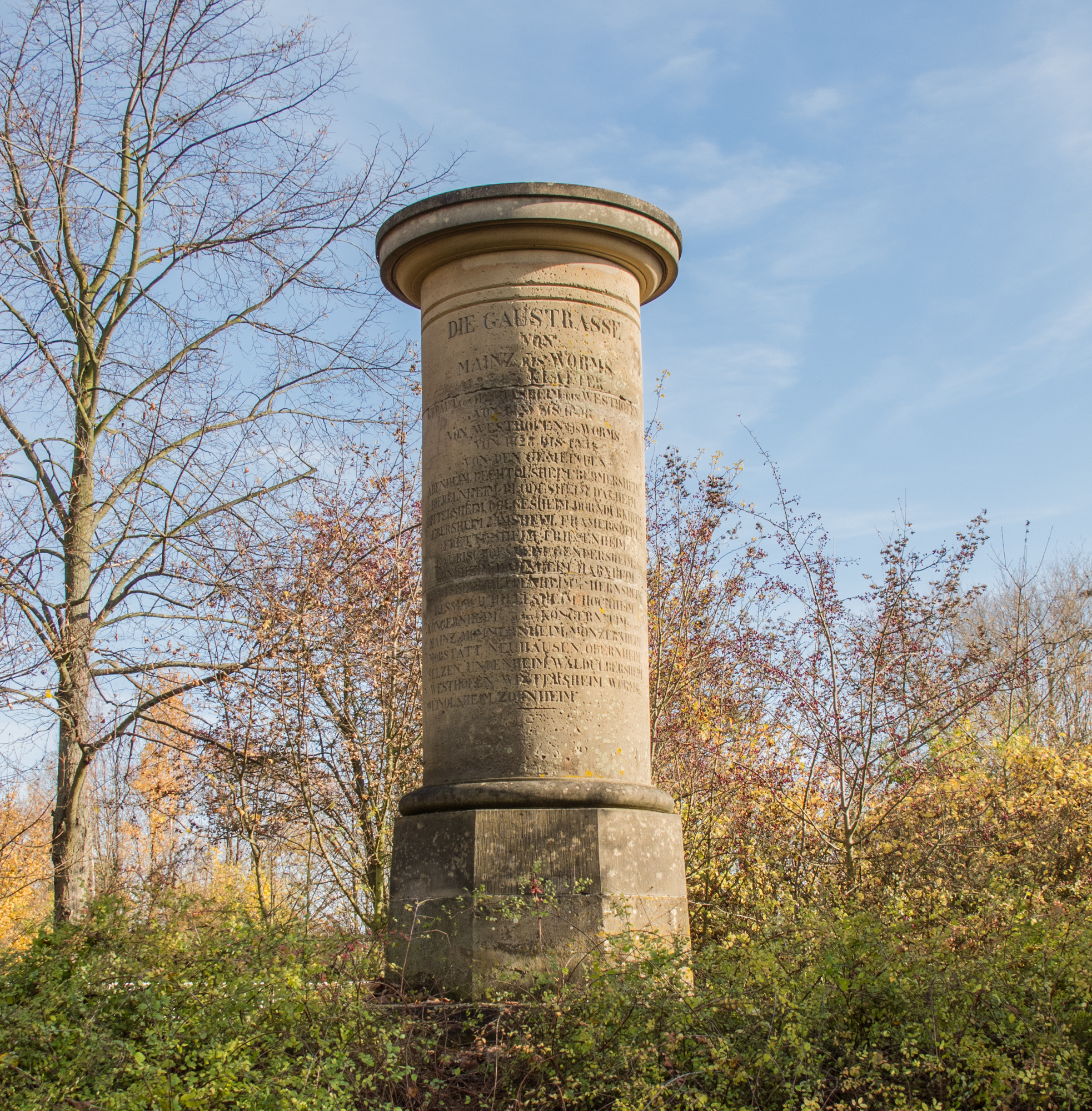 Straßendenkmal, monumentale klassizistische Säule, um 1830 Ostseite: “2 FUSS // GROSH. HESSISCHES // LÄNGENMAAS // WOVON 4 EINEN METRE // 10 EINE GR. HESSISCHE // KLAFTER // UND 1500 KLAFTER // EINE STUNDE // BETRAGEN.” —Inschrift nicht auf dem Bild sichtbar Westseite: “DIE GAUSTRASSE // VON // MAINZ BIS WORMS // … KLAFTER // ERBAUT VON HECHTSHEIM BIS WESTHOFEN // VON 1826 BIS 18.. // VON WESTHOFEN BIS WORMS // VON 1826(8) BIS 18.. // VON DEN GEMEINDEN // ABENHEIM, BECHTOLSHEIM, BERMERSHEIM // BIEBELNHEIM, BLÖDESHEIM (=Hochborn), DALHEIM, // DITTELSHEIM, DOLGESHEIM, DORNDÜRKHEIM // EBERSHEIM, EIMSHEIM, FRAMERSHEIM // FRETTENHEIM, FRIESENHEIM // GAUBISCHOFSHEIM … // GUNTERSBLUM … HARXHEIM // … // HESSLOCH, HILLESHEIM, HOCHHEIM // KÖNGERNHEIM, (ALZEY klein geschrieben, da Gau-Köngernheim heute gemeint ist) KÖNGERNHEIM (MAINZ klein geschrieben) // MAINZ, MOMMENHEIM, MONZERNHEIM // MÖRSTATT, NEUHAUSEN, ODERNHEIM // SELZEN, UNDENHEIM, WALDÜLBERSHEIM // WESTHOFEN, WINTERSHEIM, WORMS // WEINOLSHEIM, ZORNHEIM.” —Inschrift wie im Bild sichtbar